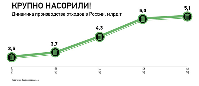 Динамика производства отходов в России